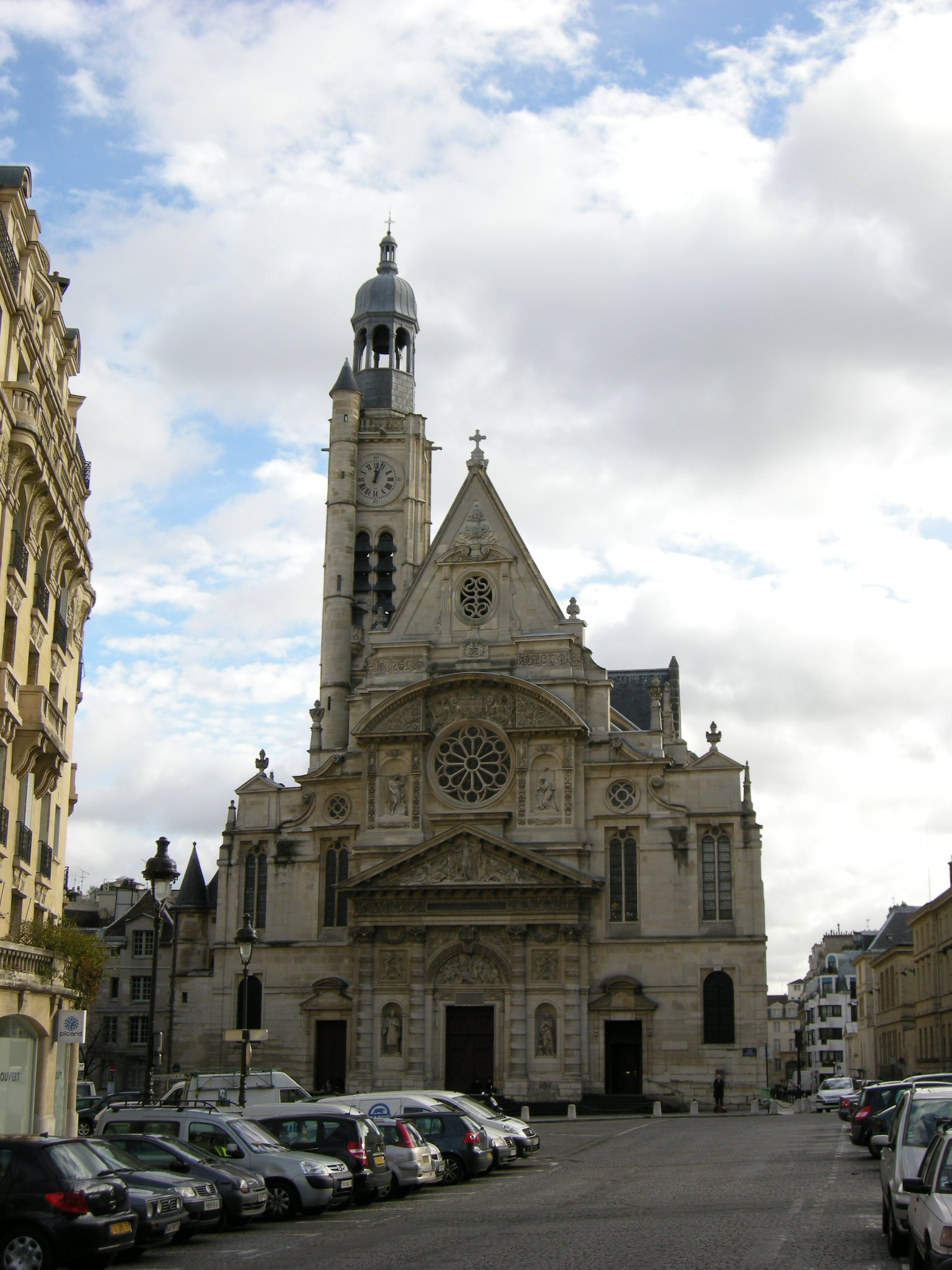 Saint-etienne-du-mont